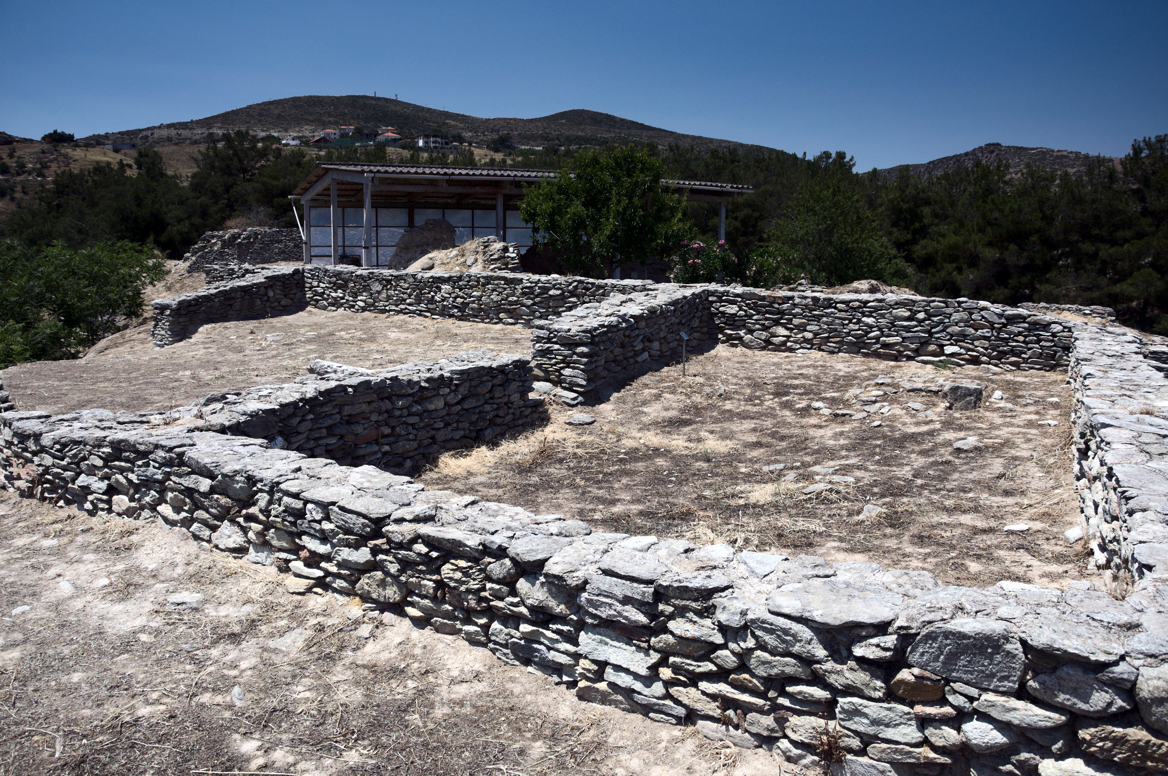 Μέγαρο νεολιθικής εποχής στο Σέσκλο«Μέγαρο νεολιθικής εποχής στο Σέσκλο»